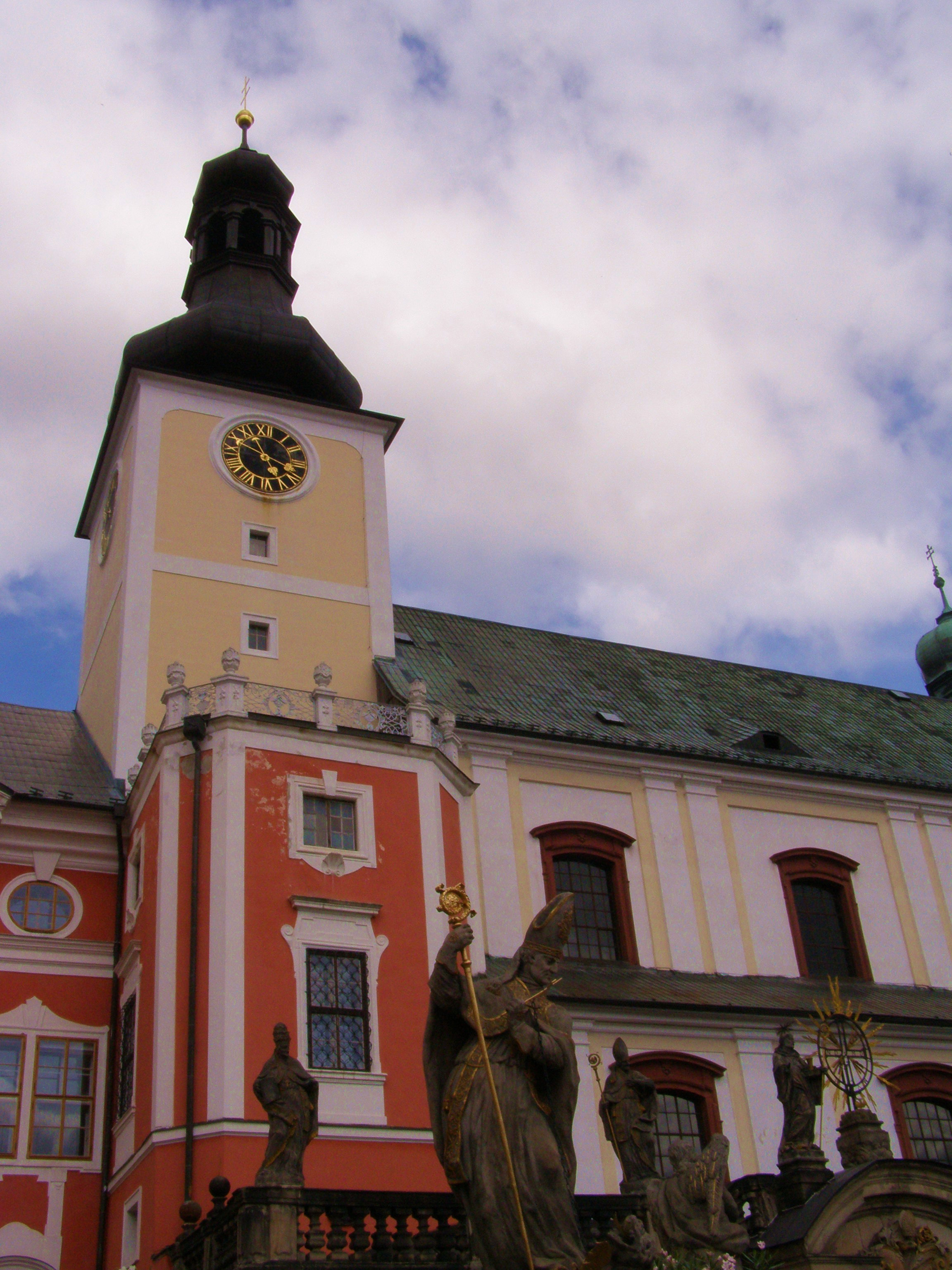 Broumov, klášterní kostel svatého Vojtěcha